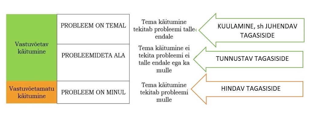 Kuidas tagasisidestada erinevale sõltuvalt probleemi nn asukohast